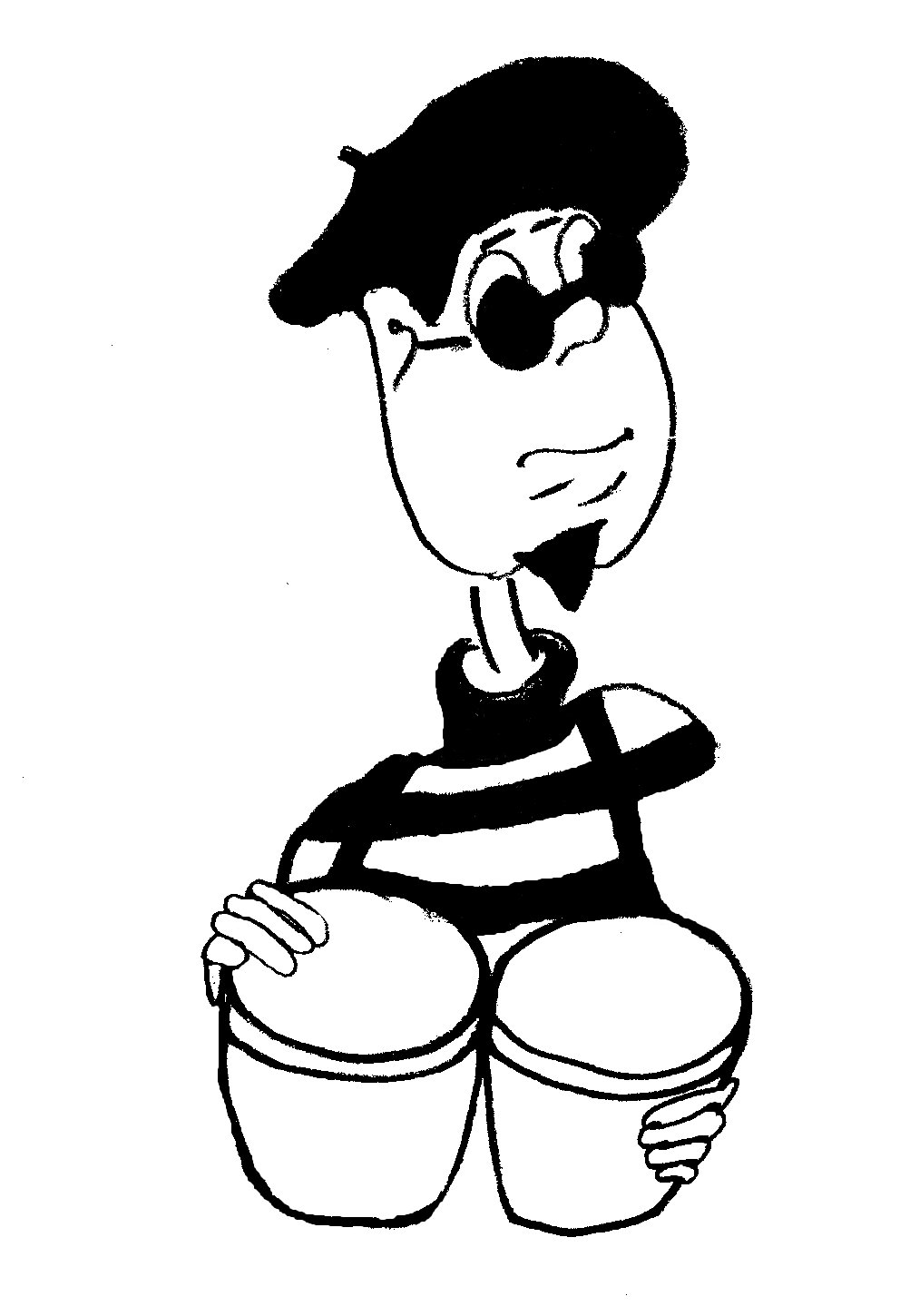 Beatnik stereotype